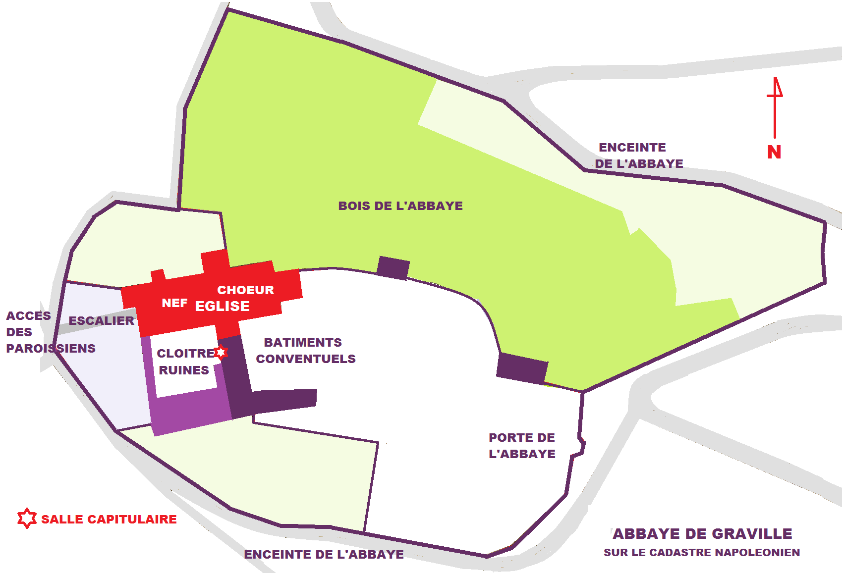 Abbaye de Graville (76) sur le cadastre napoléonien